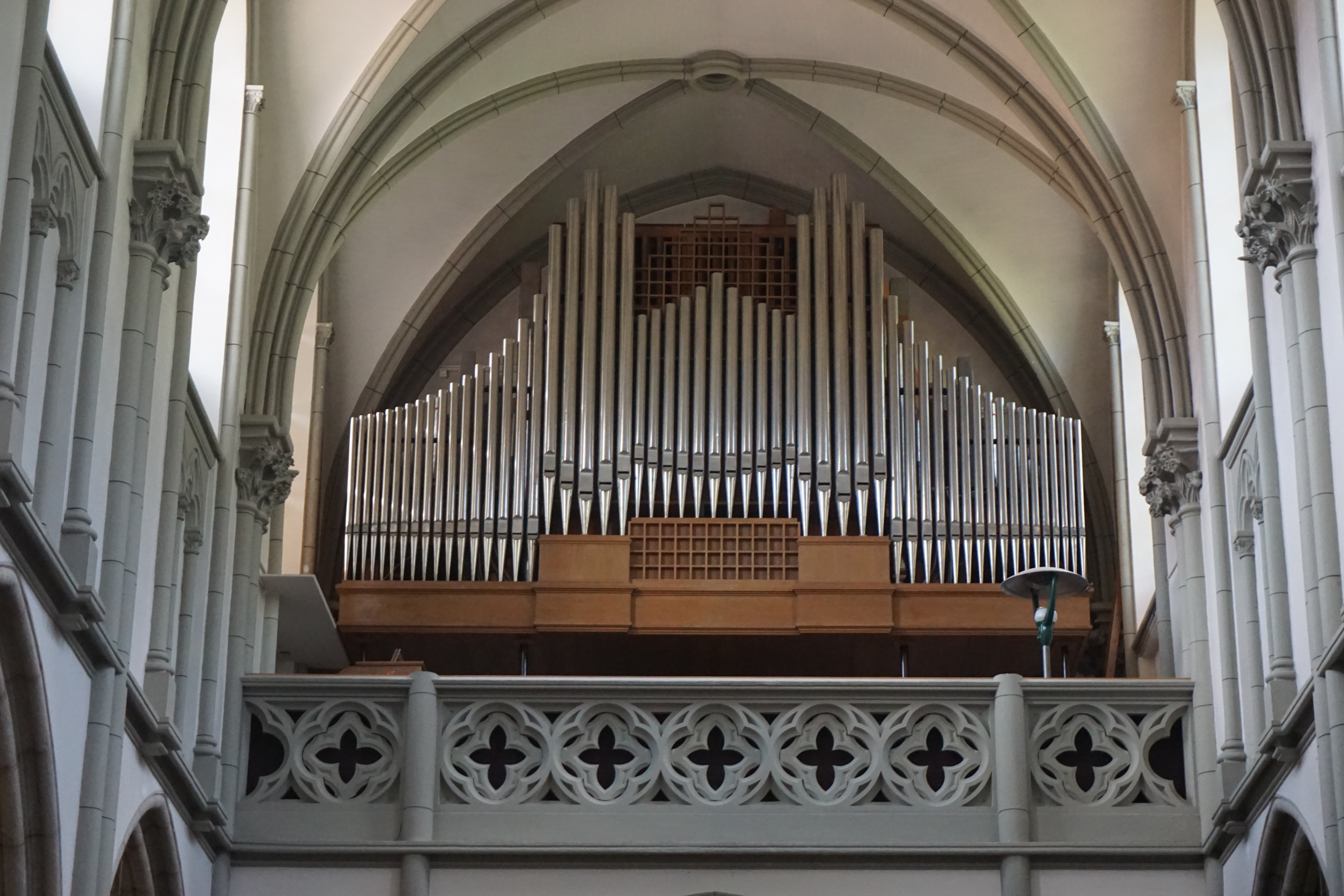 Saint-Martin Orgel